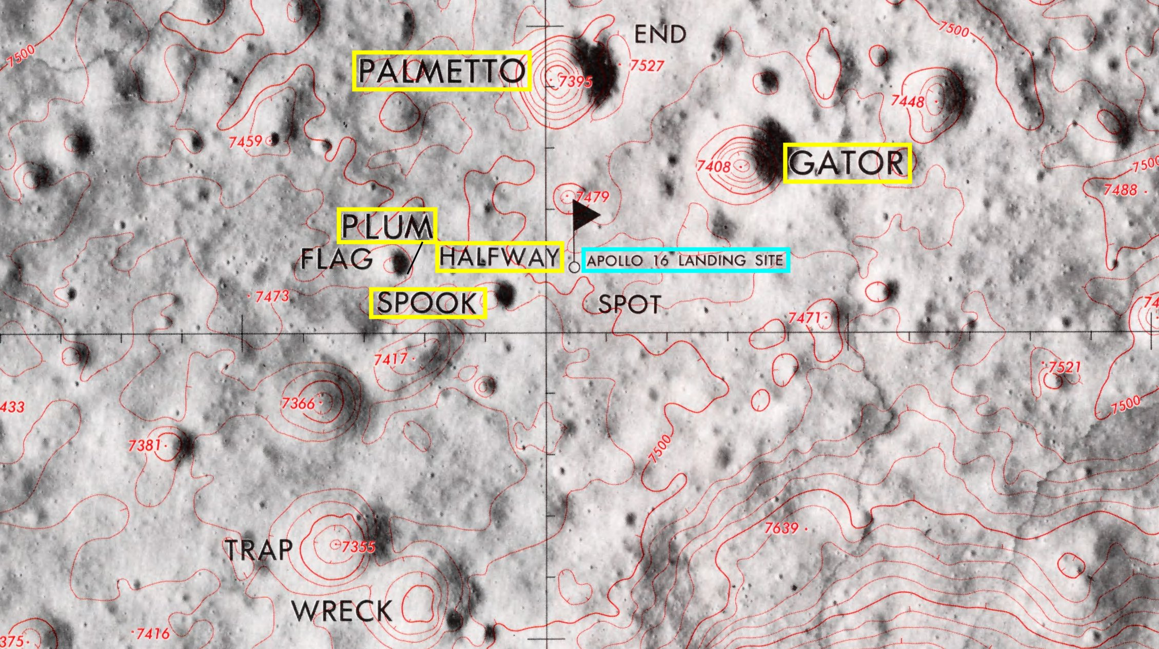 Lugar de aterrizaje del Apolo 16. (Lunar Topophotomap 78D2S1(50) Apollo 16 Landing Area)